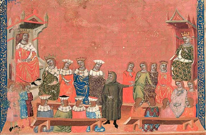 Svatopluk v přestrojení za mnicha před králem Arnulfem a dvorem. Levou rukou ukazuje patrně na svou ženu, podle Dalimilovy kroniky sestru krále Arnulfa žijící na jeho dvoře.